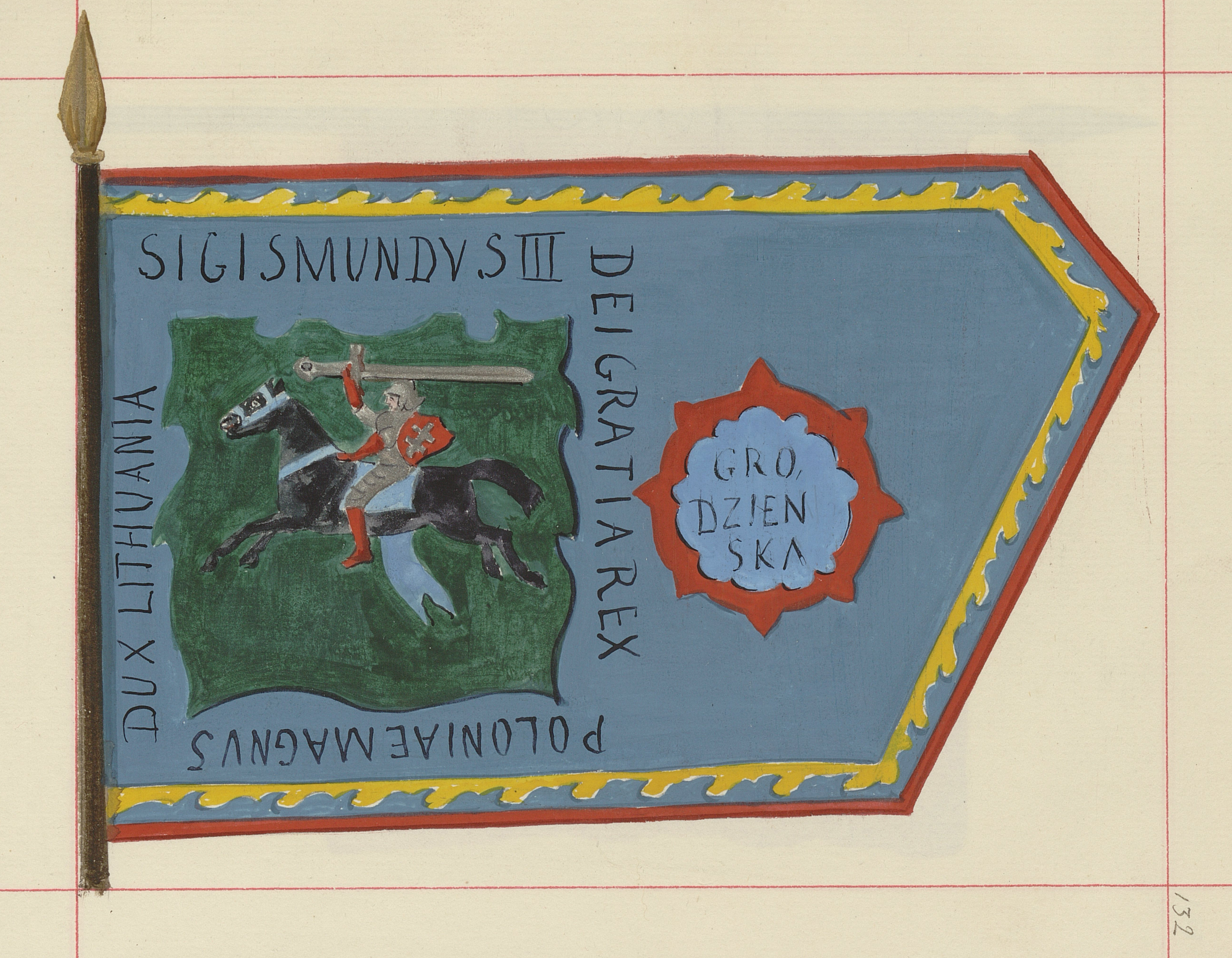 Беларуская (тарашкевіца): Харугва паспалітага рушаньня Гарадзенскага (Horadnia) павету Пагоняй (Pahonia)